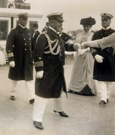 Im Vordergrund: Johannes von Karpf (1867-1941), Kommandant auf der SMY Hohenzollern, Staatsjacht des Deutschen Kaiserreiches